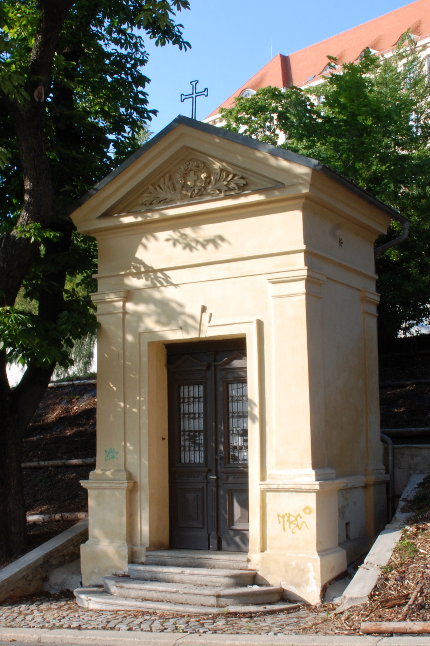 Kaple Ecce homo z roku 1897 v ulici I. P. Pavlova v Karlových Varech